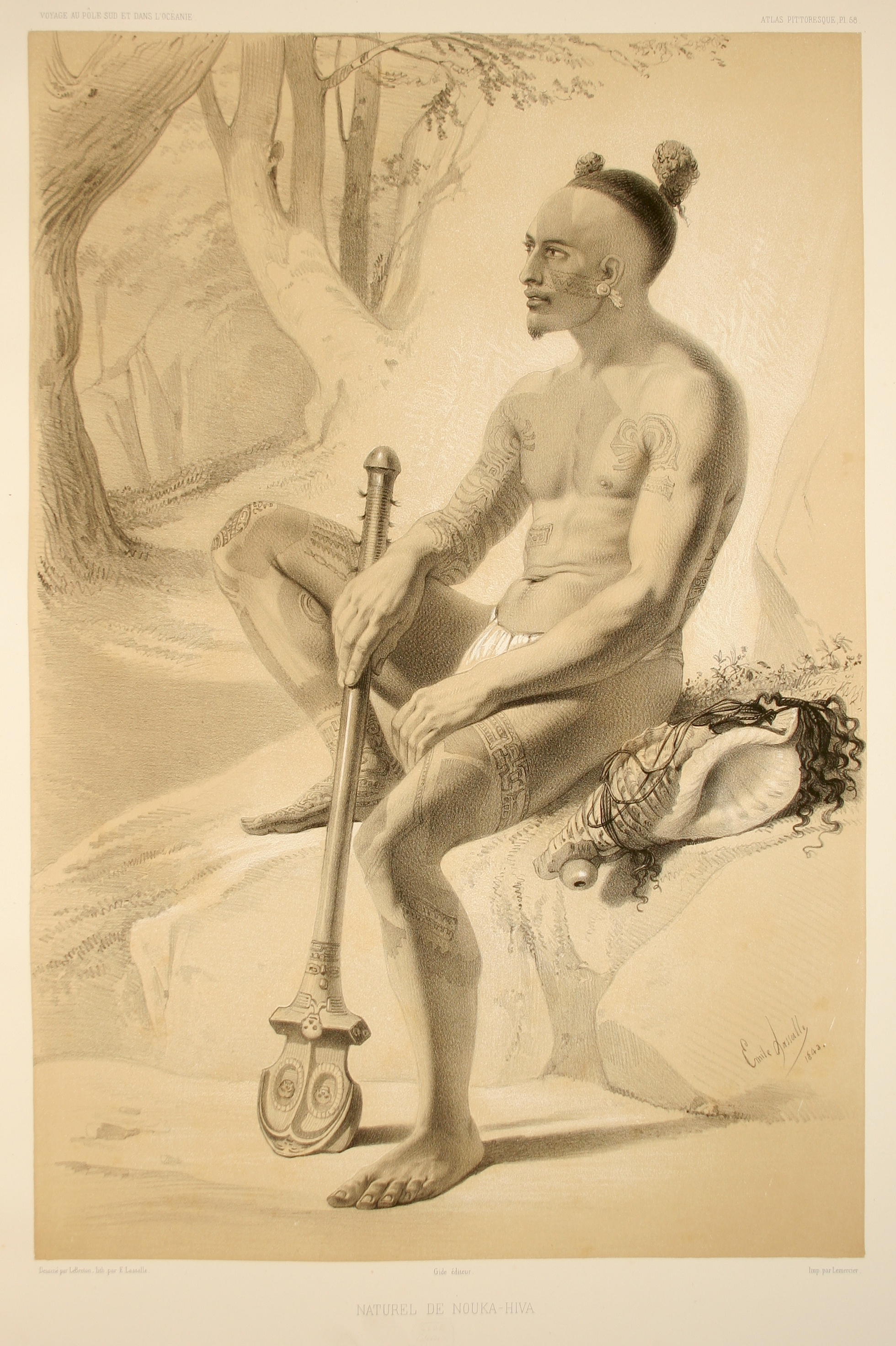 Naturel de Nouka-Hiva. Atlas pittoresque, planche 58